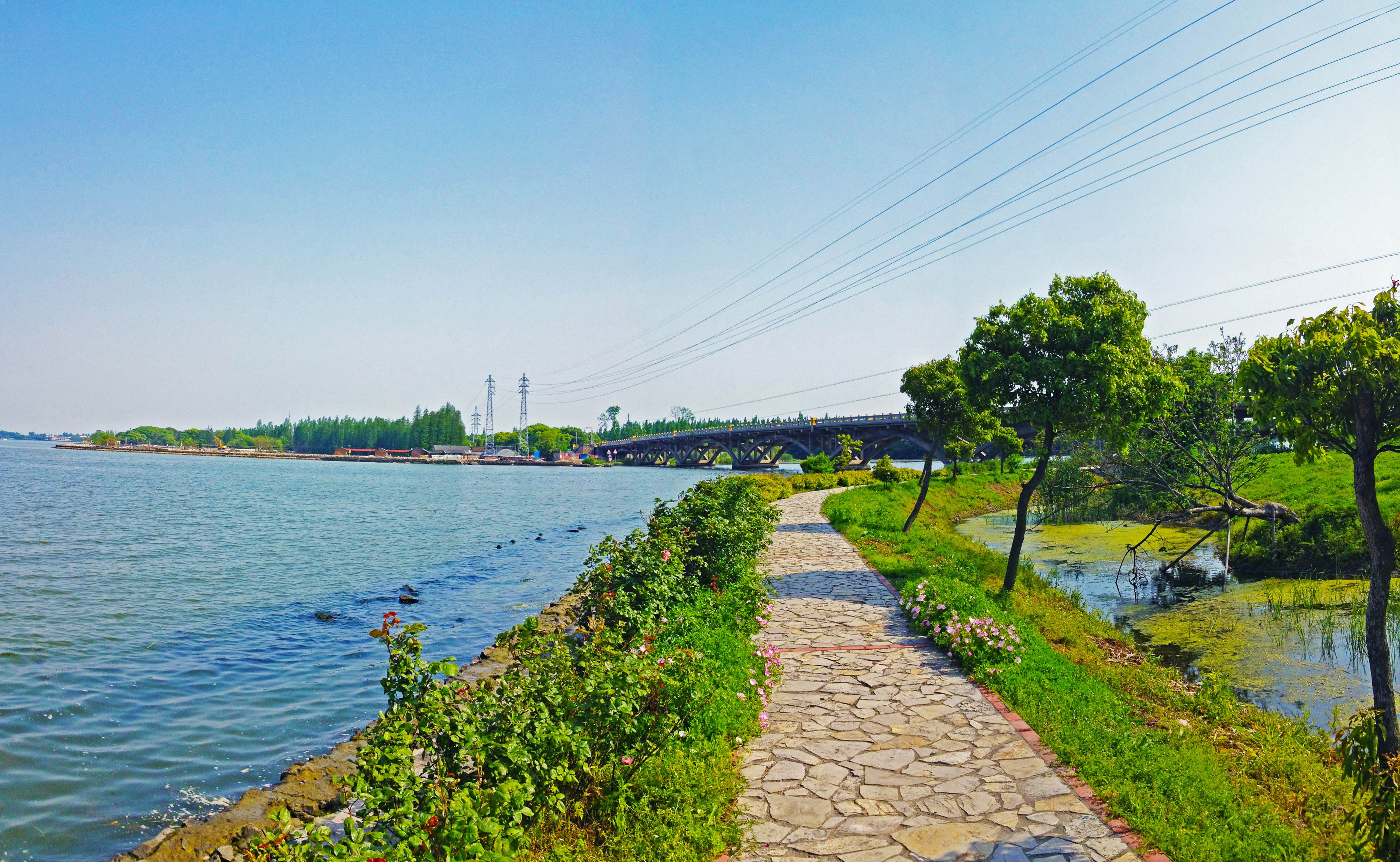 20130501金泽淀山湖岸步道